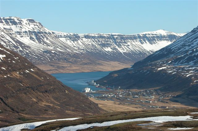 Seyðisfjörður